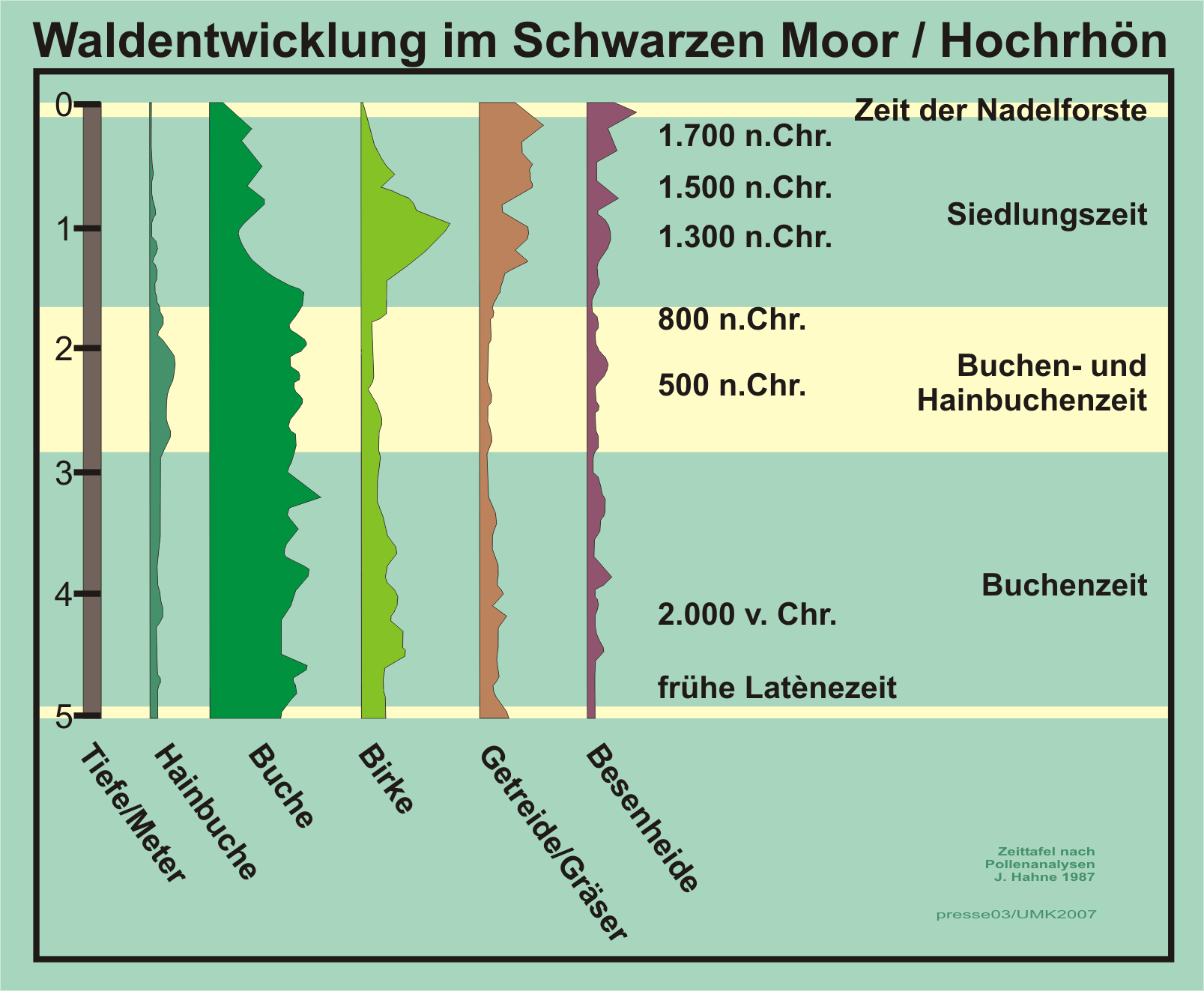 Waldentwicklungsplan nach Pollenanalysen im Schwarzen Moor in der Hochrhön, Deutschland